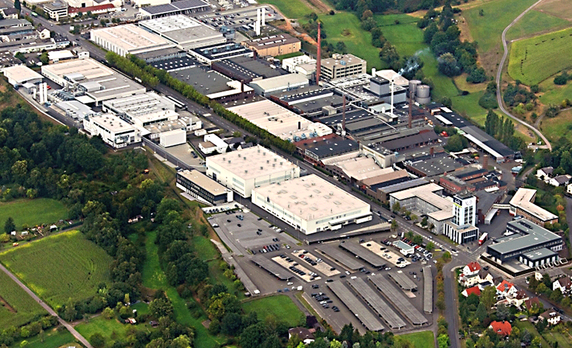 Luftaufnahme der Firmenzentrale in Gießen